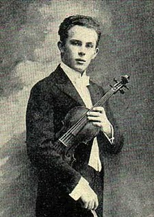 Václav Příhoda - český houslista